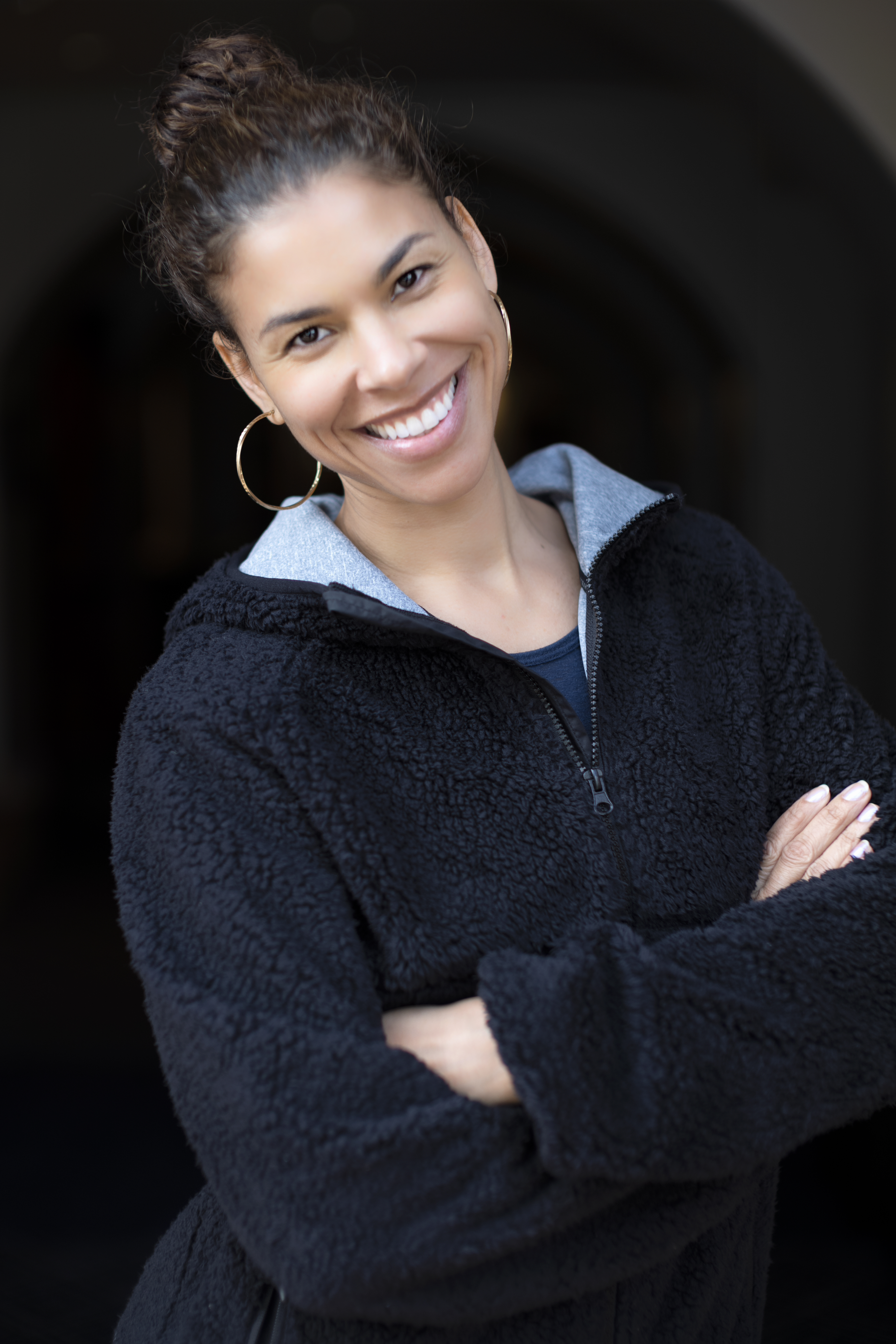 Gwendolyn Osborne in 2020.